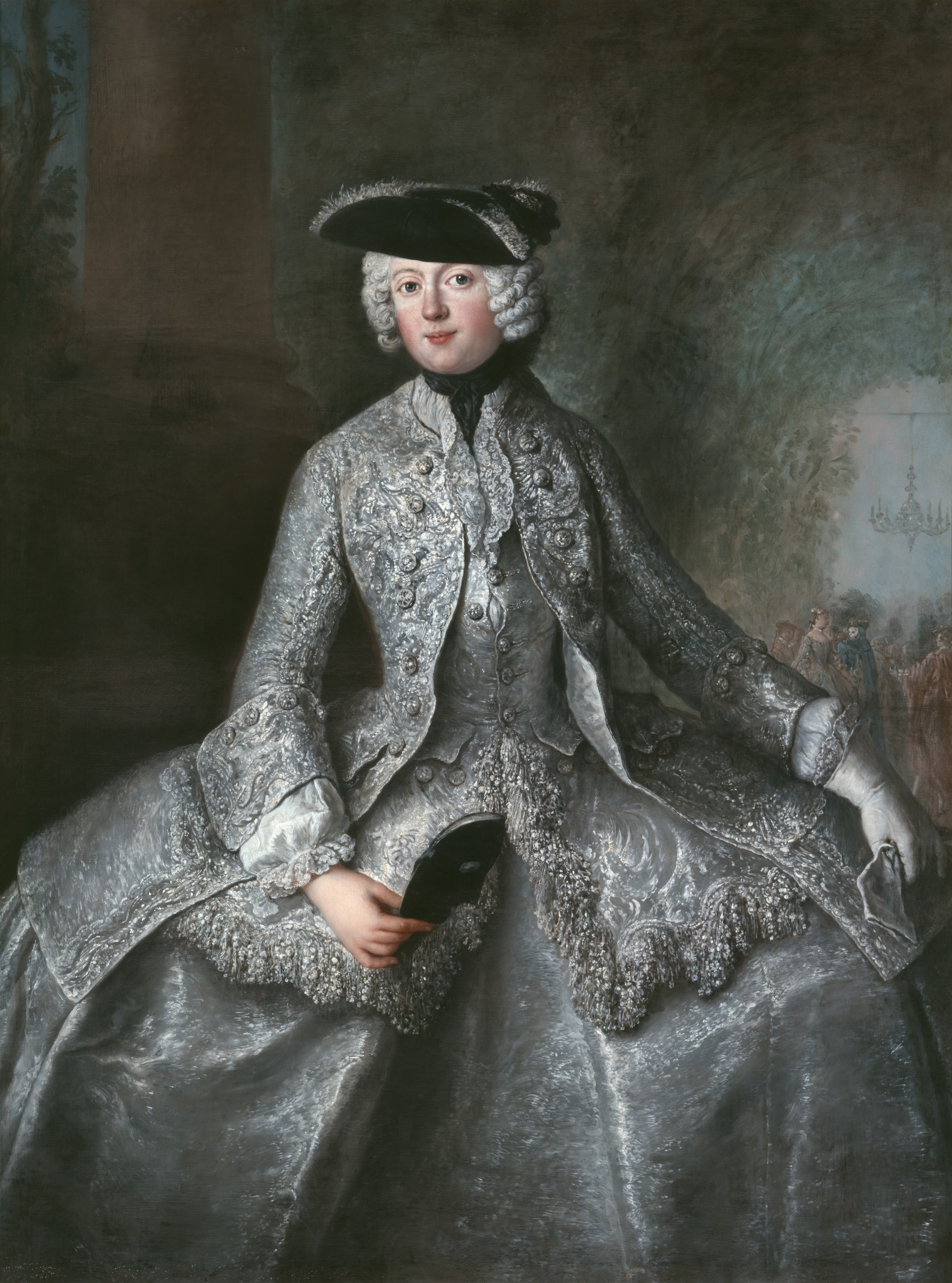 Prinzessin Amalie von Preußen (1723-1787) als Amazone